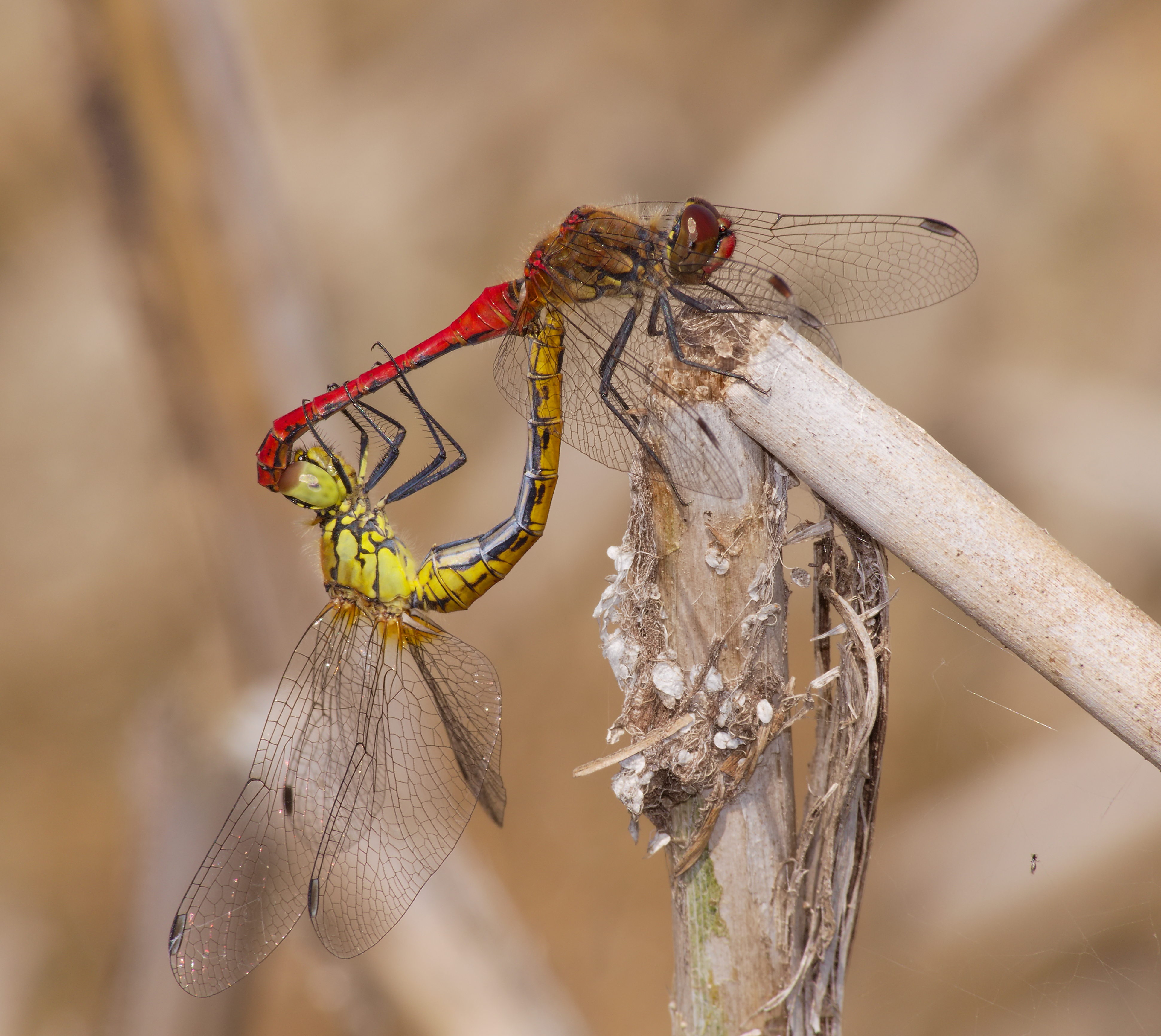 Blutrote Heidelibelle - Sympetrum sanguineum, Paarung. Aufgenommen in Eilenburg-Hainichen, Sachsen, Deutschland.